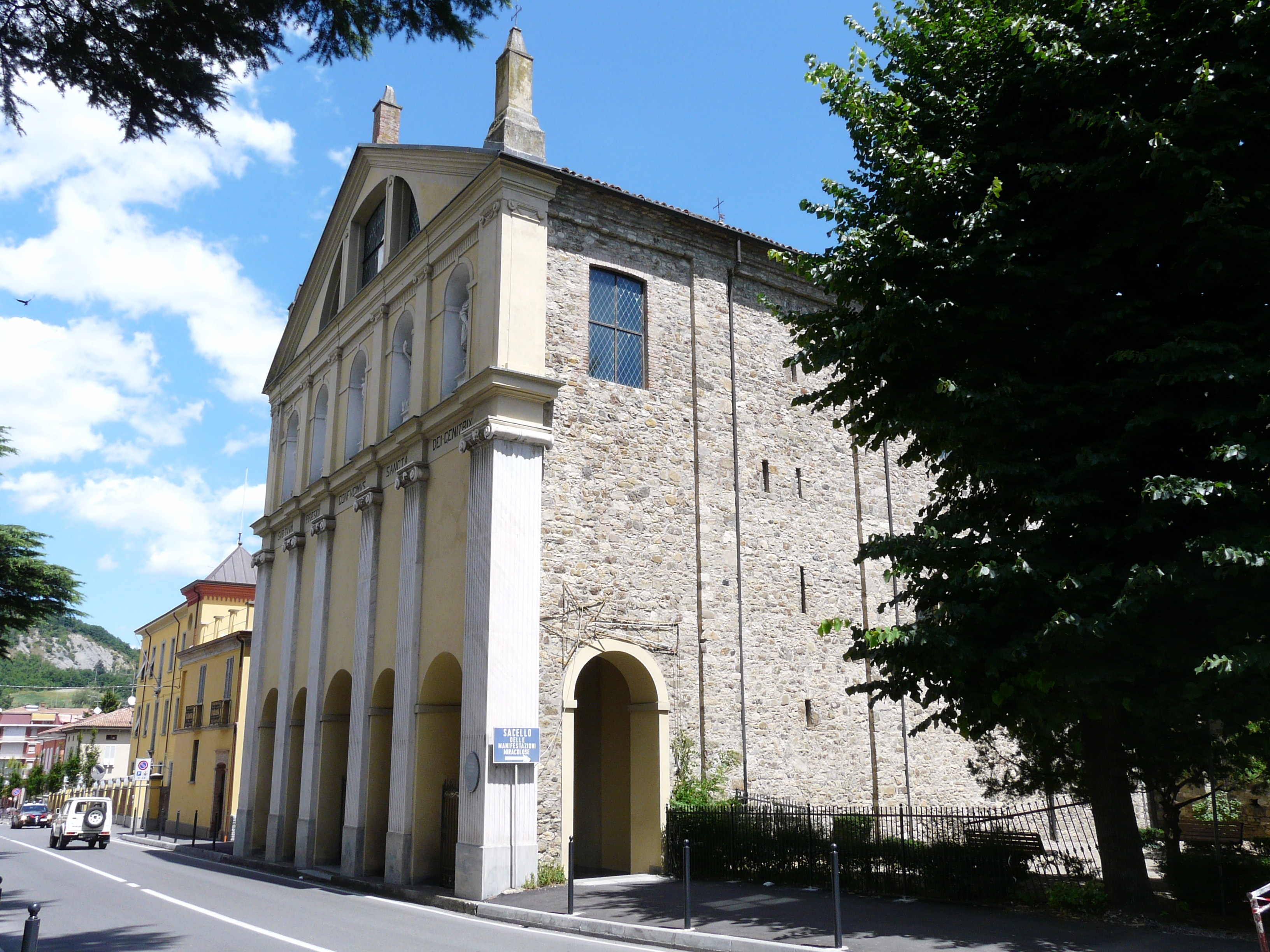 Immagini del santuario della Madonna dell'Aiuto di Bobbio, Emilia-Romagna, Italia